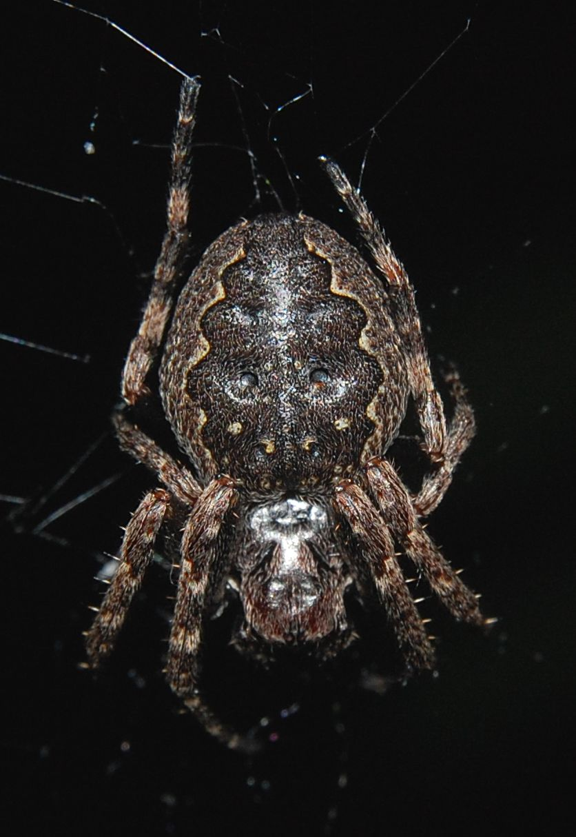 Nuctenea umbratica, female